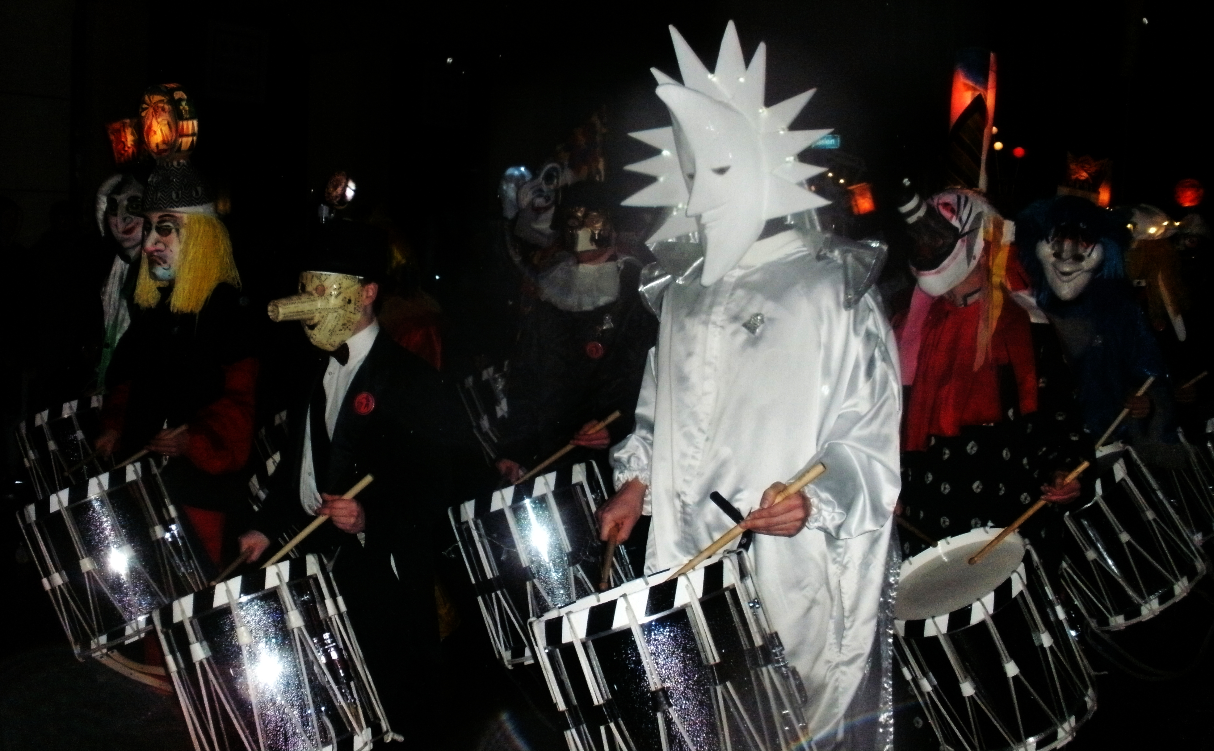 Maskierte Trommler mit Kopflaternen beim Morgestraich 2010 in Basel.